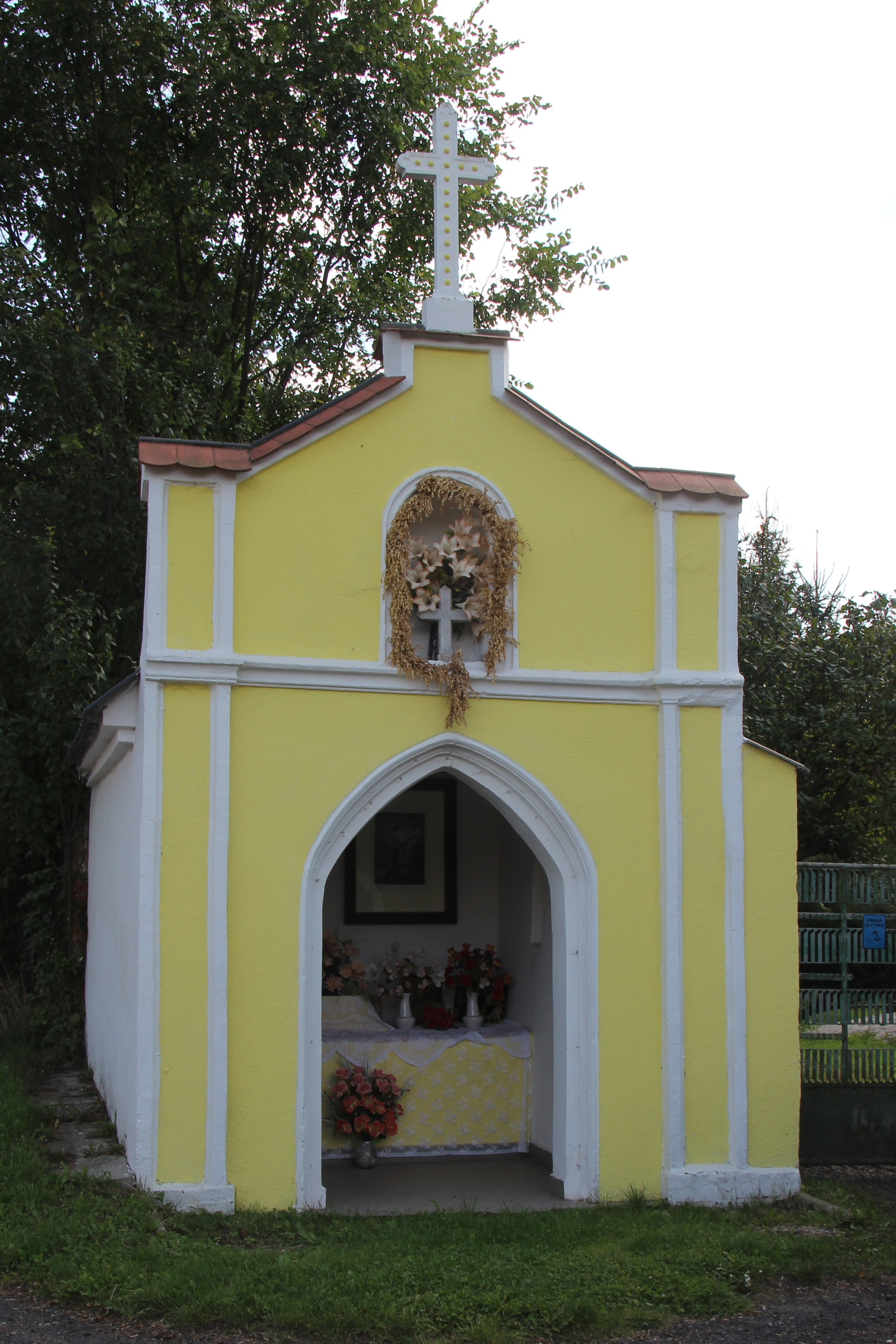 Radzikowice – wieś w Polsce położona w województwie opolskim, w powiecie nyskim, w gminie Nysa.